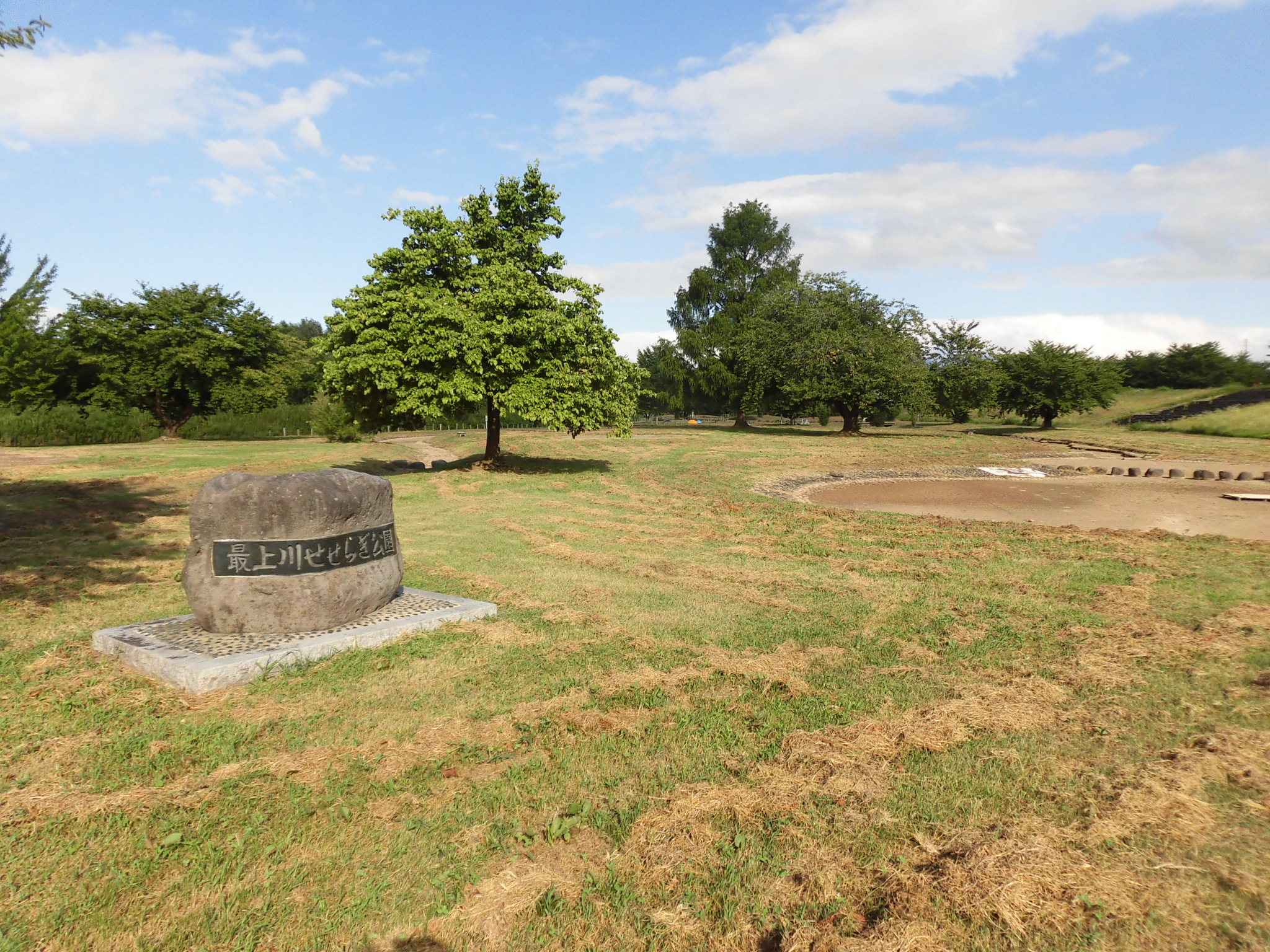 最上川中山緑地公園、最上川せせらぎ公園。山形県東村山郡中山町長崎に所在。長崎大橋の東側。